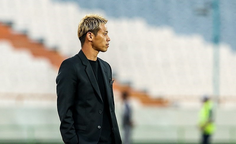 کیسوکه هوندا در حال هدایت تیم ملی کامبوج